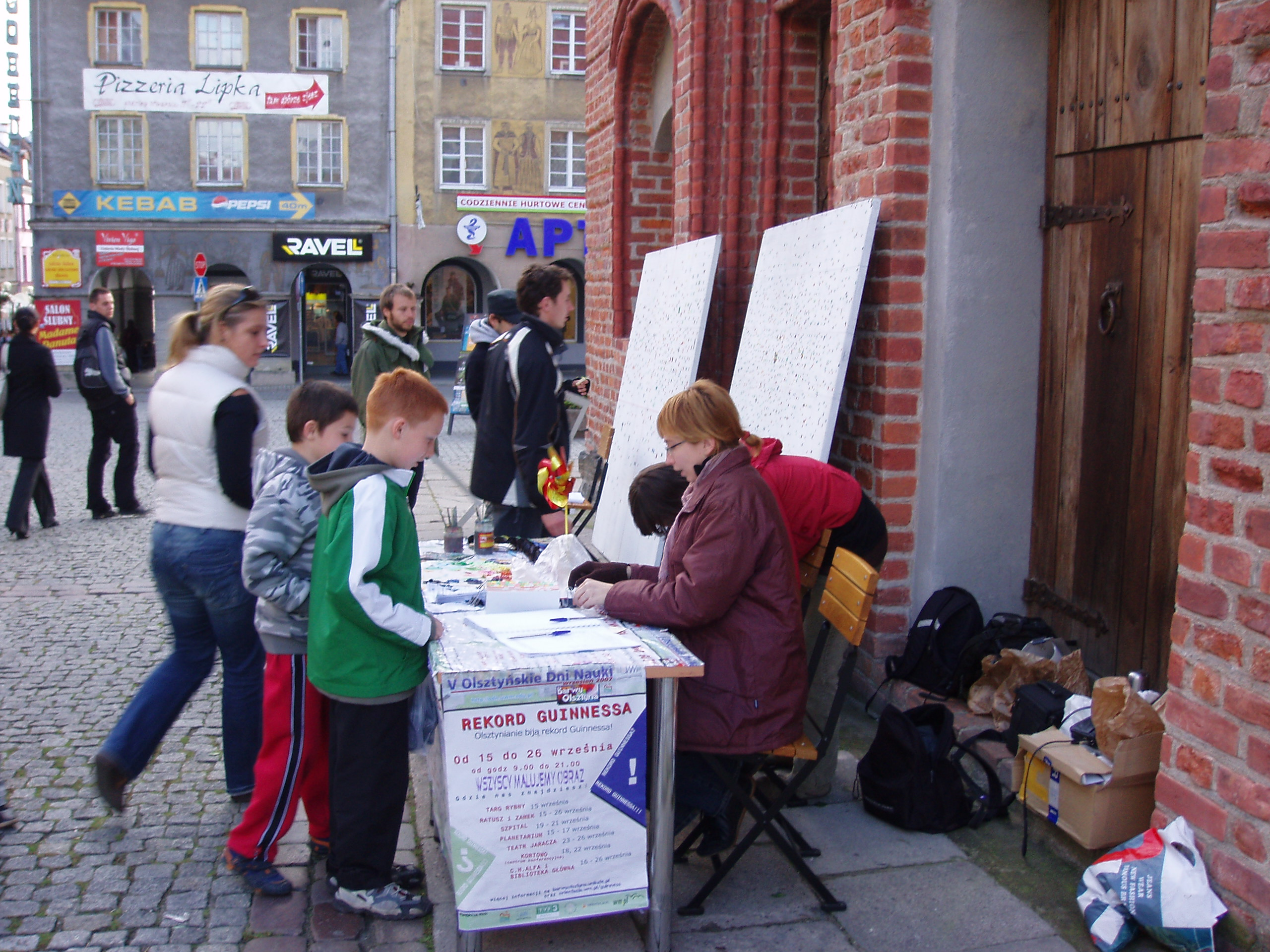 happening z malowaniem, "Barwy Olsztyna", V Olsztyńskie Dni Nauki 2007